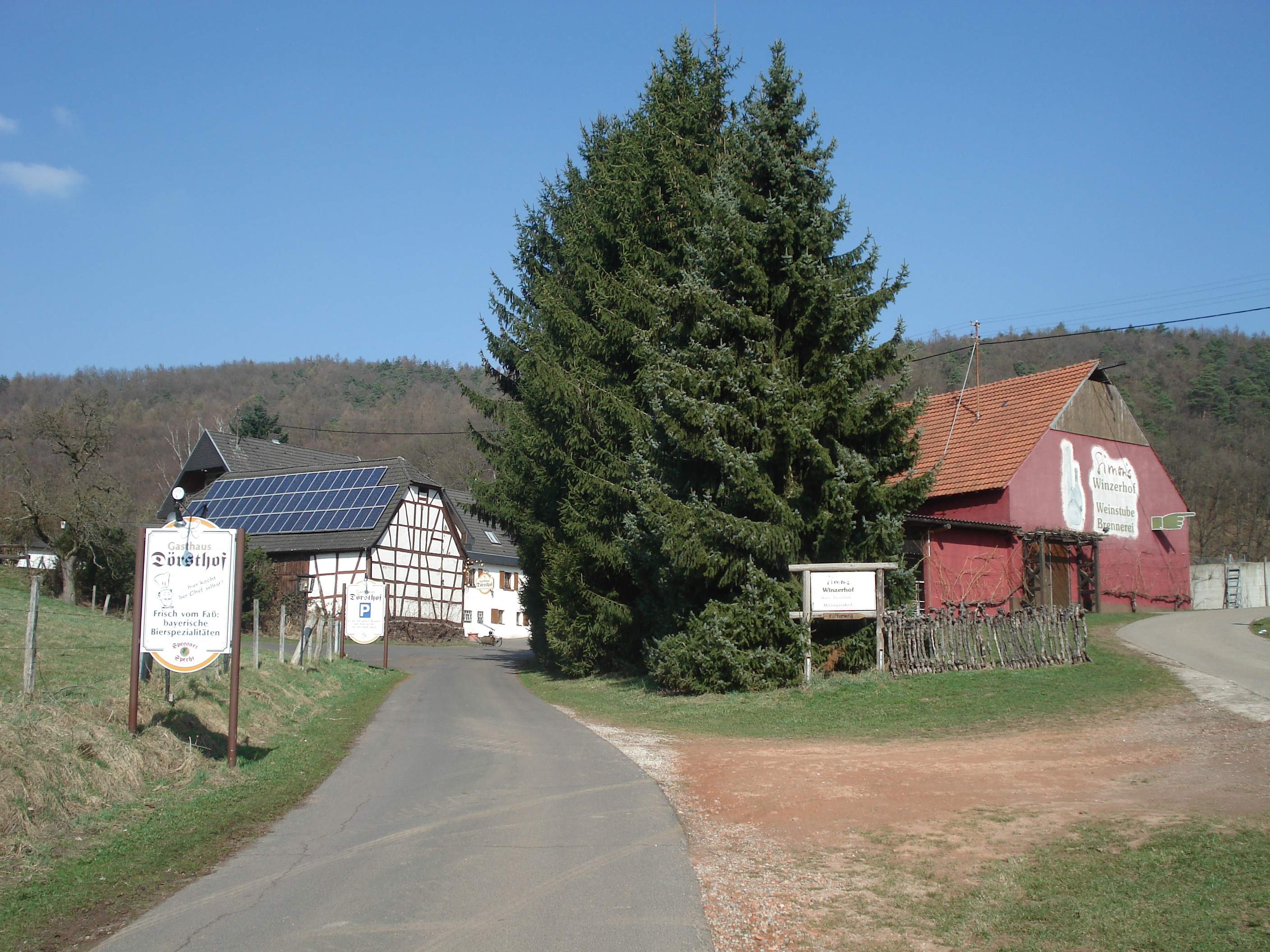 Die Dörsthöfe